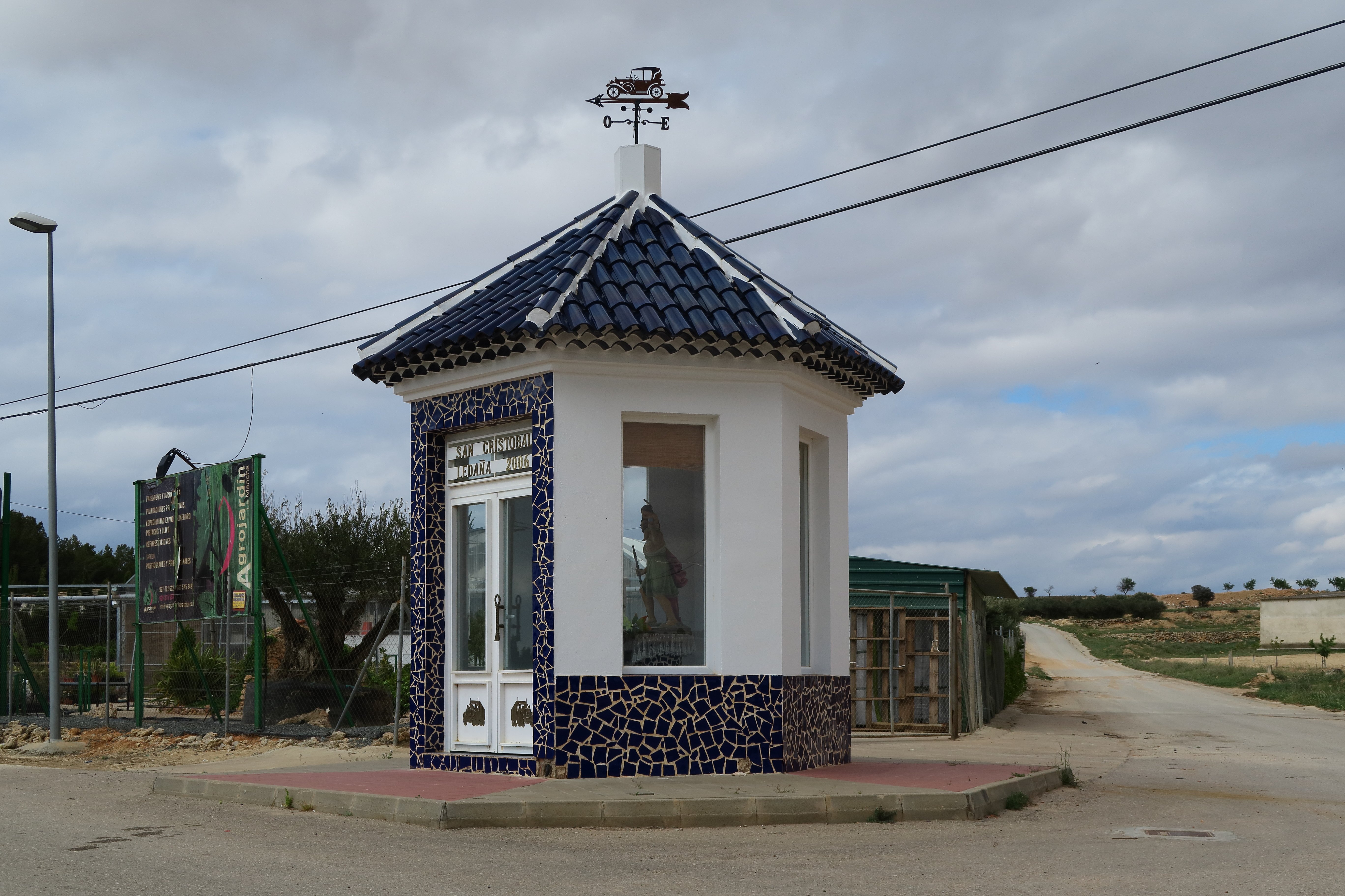 Ledaña, Ermita de Sancristobal